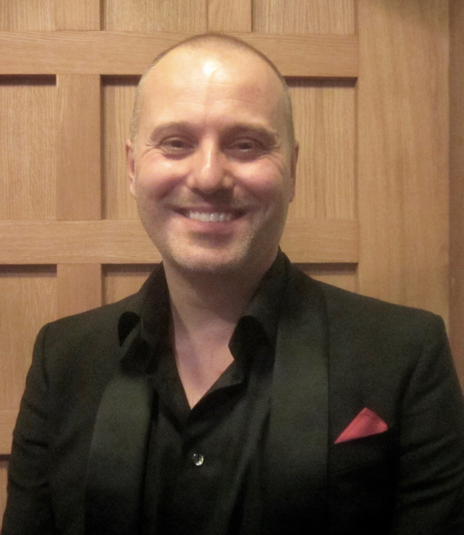 Niklas Asknergård, tidigare Andersson, efter en konsert på Kronhuset i Göteborg den 11 mars 2016.